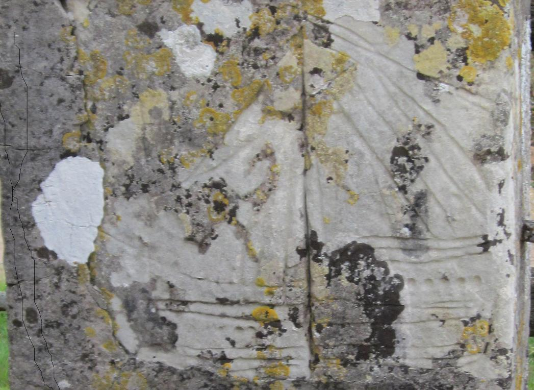 Graffiti sur l'un des poteaux de l'entrée est du cimetière de Morsalines (accès vers manoir de la Peintrerie). (50630)